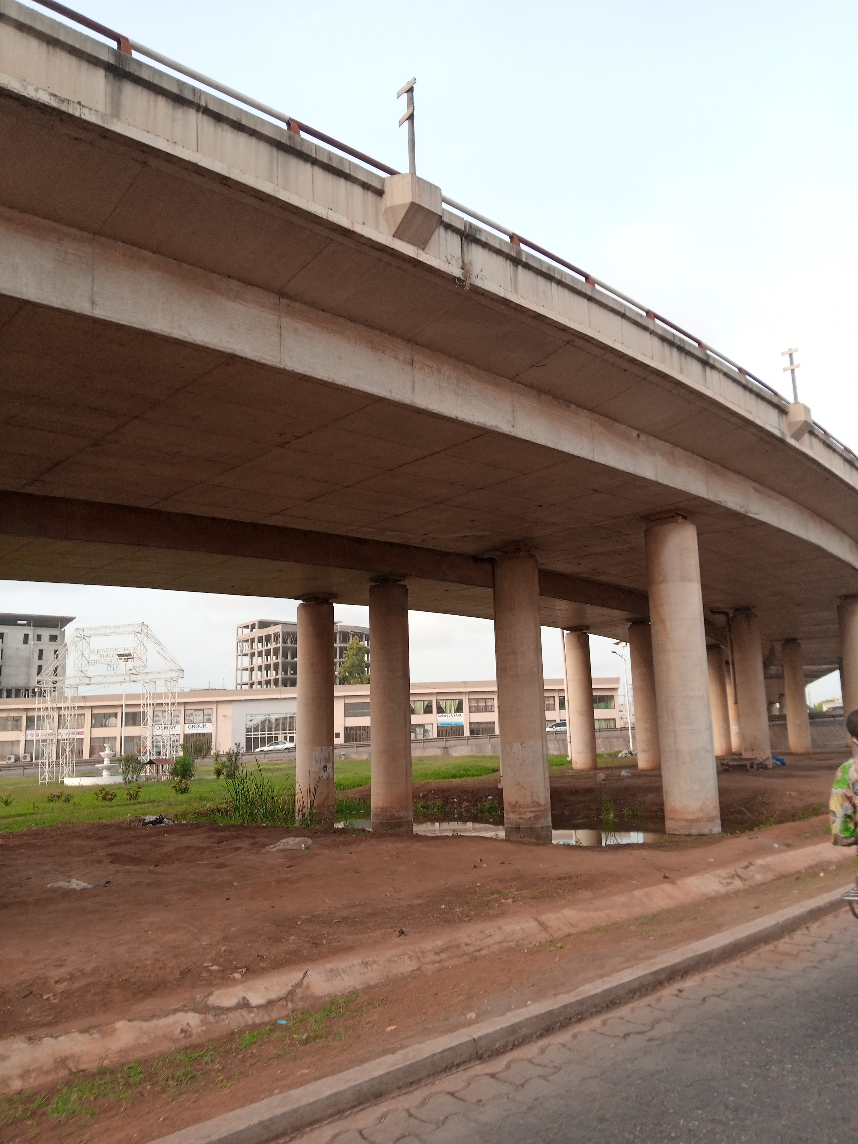 échangeur de Godomey au Bénin This is an image with the theme "Africa on the Move or Transport" from: Benin